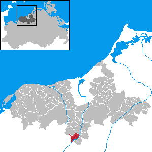 Vorbeck in Mecklenburg-Western Pomerania - District Bad Doberan